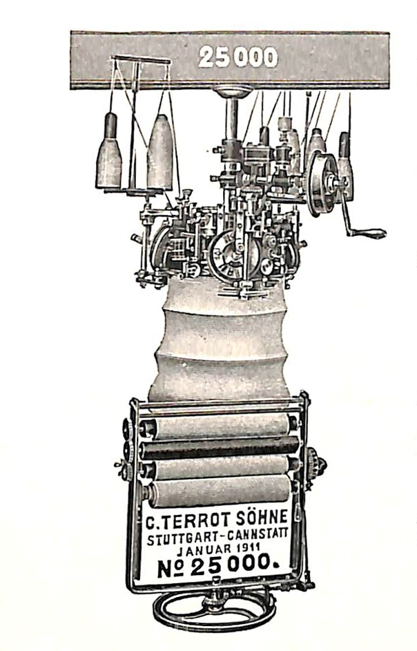 Cannstatt - Das Unternehmen fertigt Rundstrickmaschinen und wurde 1862 in Stuttgart gegründet, 1877 von Charles Terrot übernommenen, die 1882 in Cannstadt neu erbaute Maschinenfabrik und Gießerei wurde seit 1901 von den Terrot Söhnen geleitet.